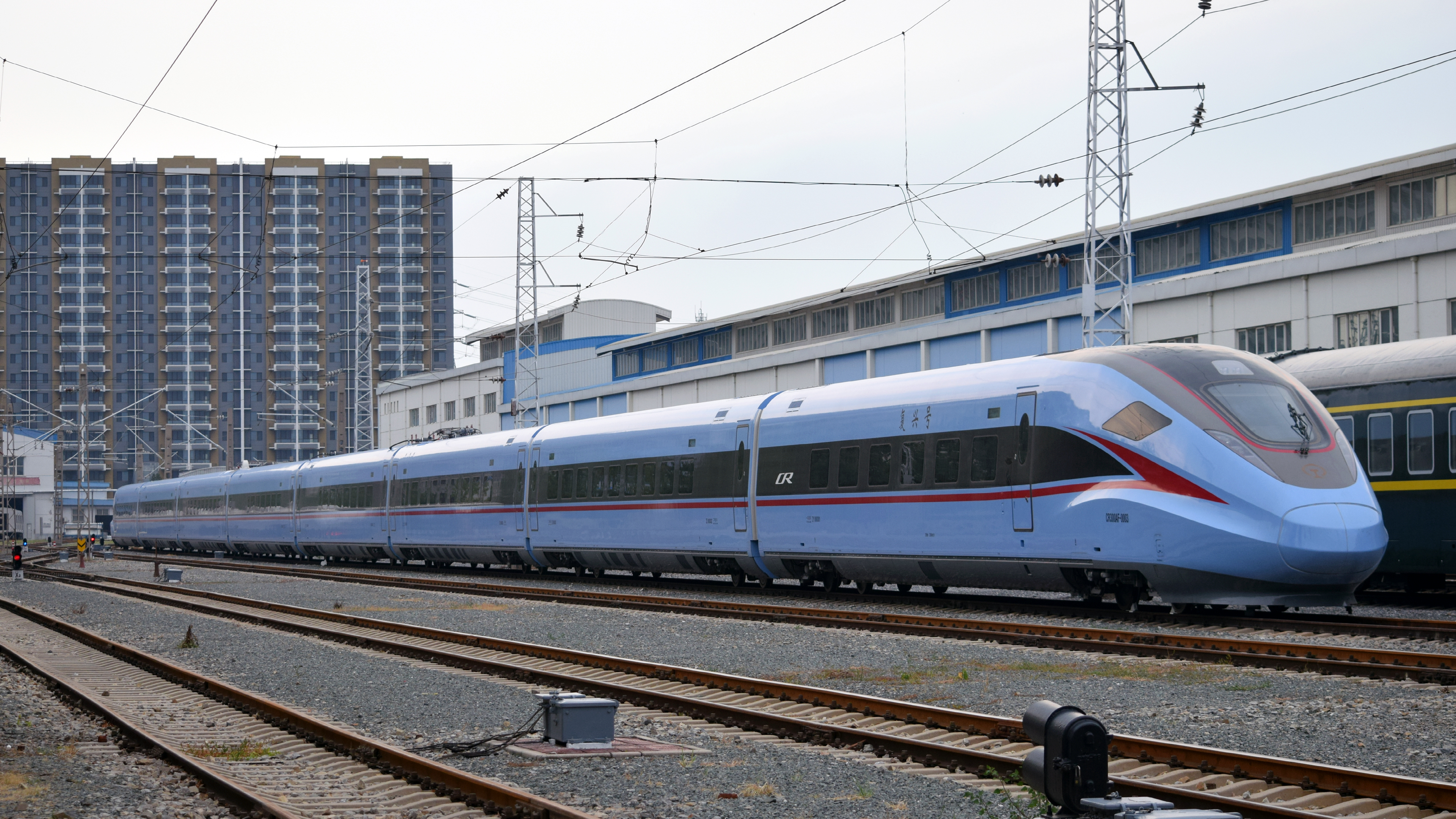 中文（中国大陆）: CR300AF-0003位于北京环形铁道